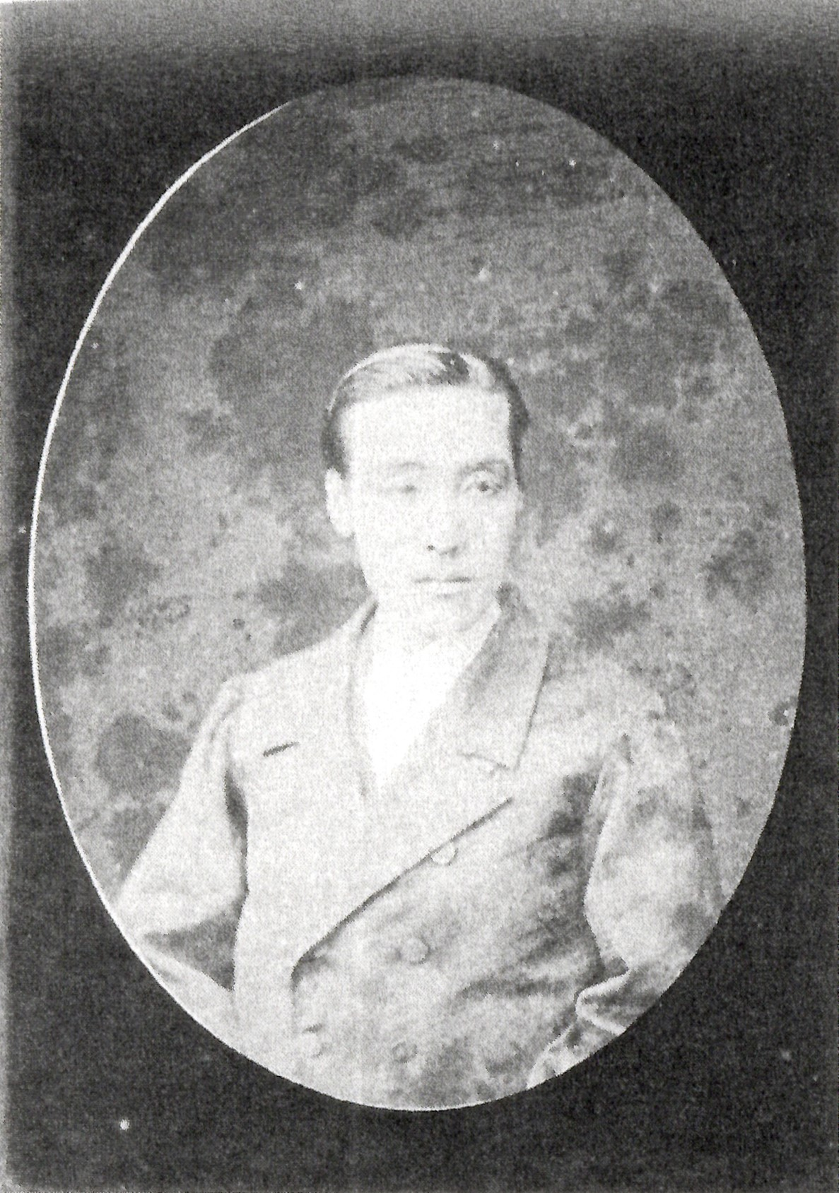 本多正憲の肖像写真。